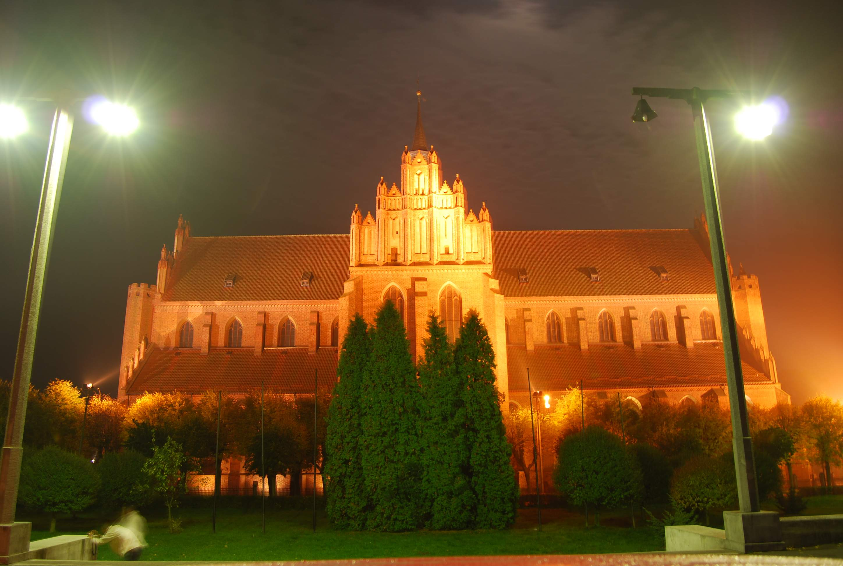 Katedra nocą Cathedral night .........